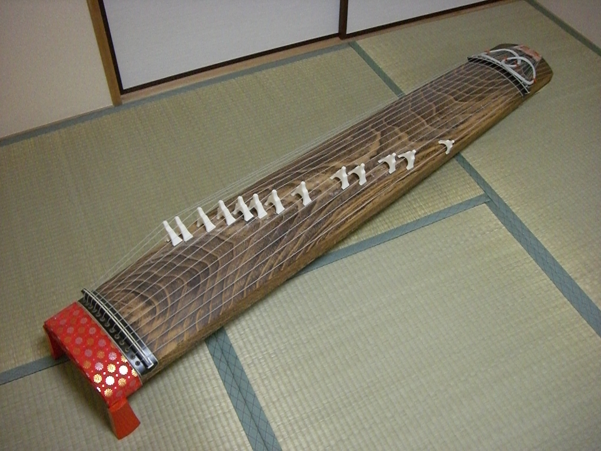 箏の全体図 Japanese Koto (sou)